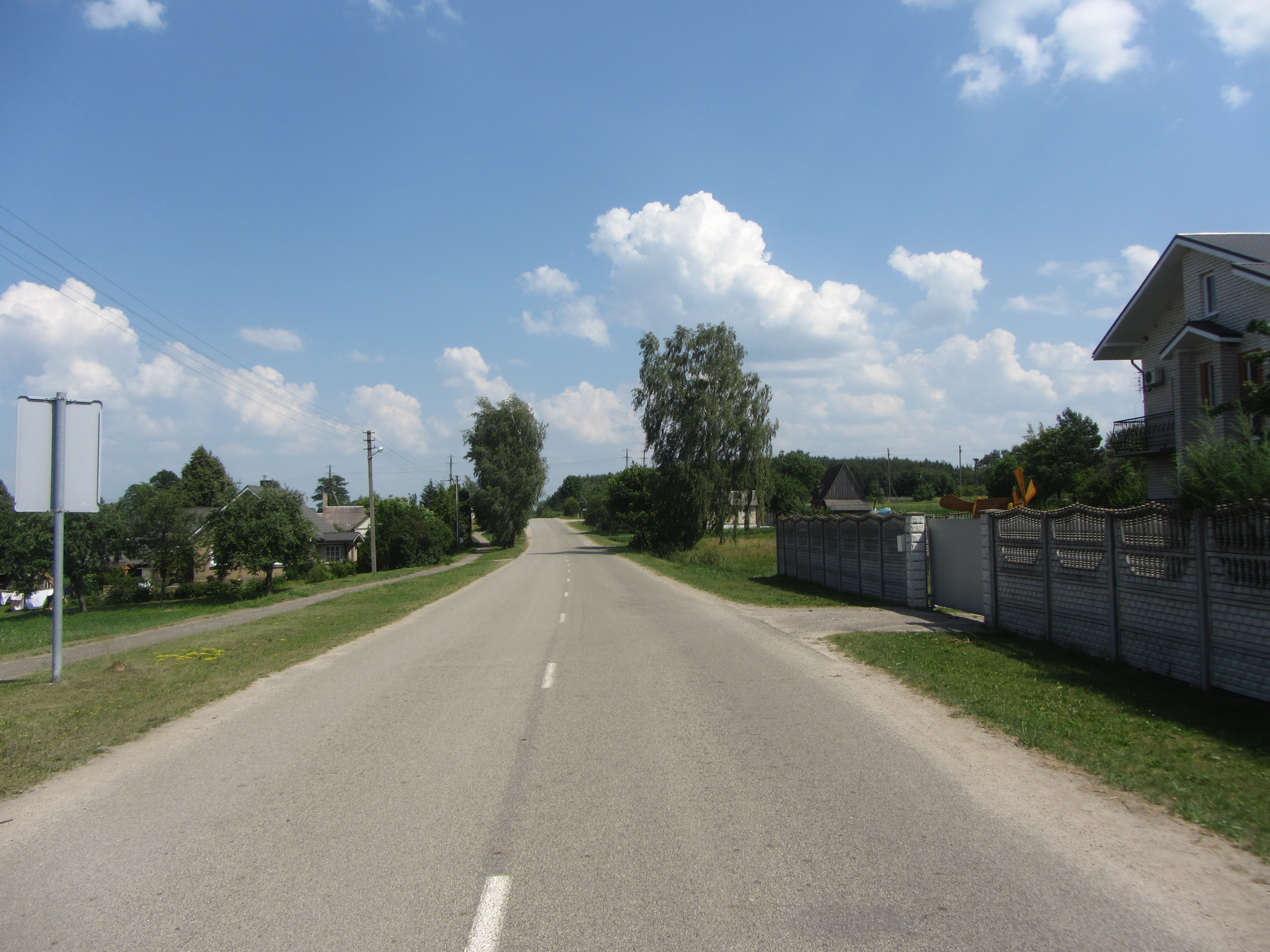 Verstaminai 67412, Lithuania